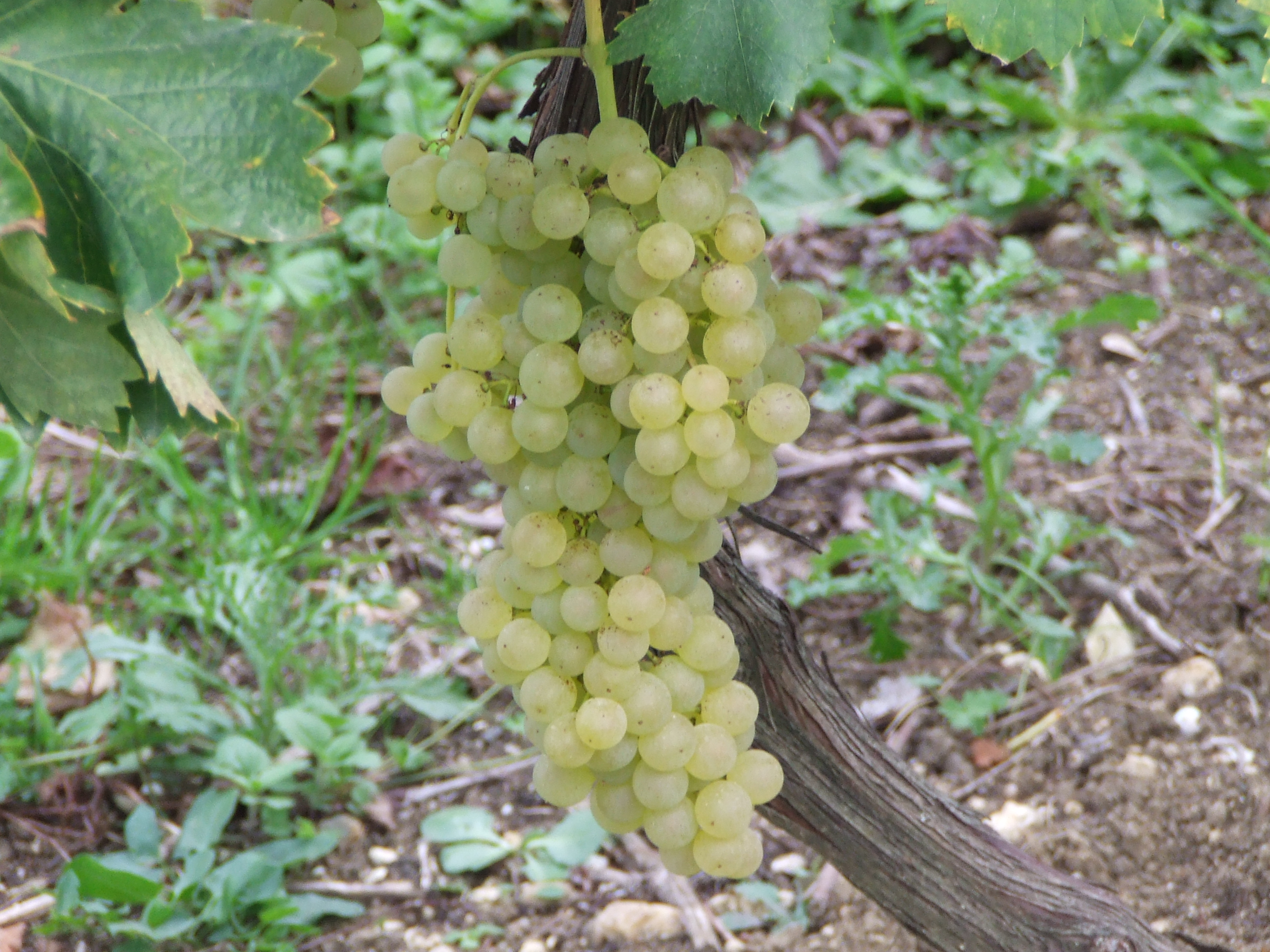 Cépage Ugni blanc - Région de Cognac